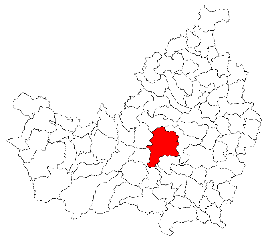 Categorie:Hărţi ale judeţului Cluj